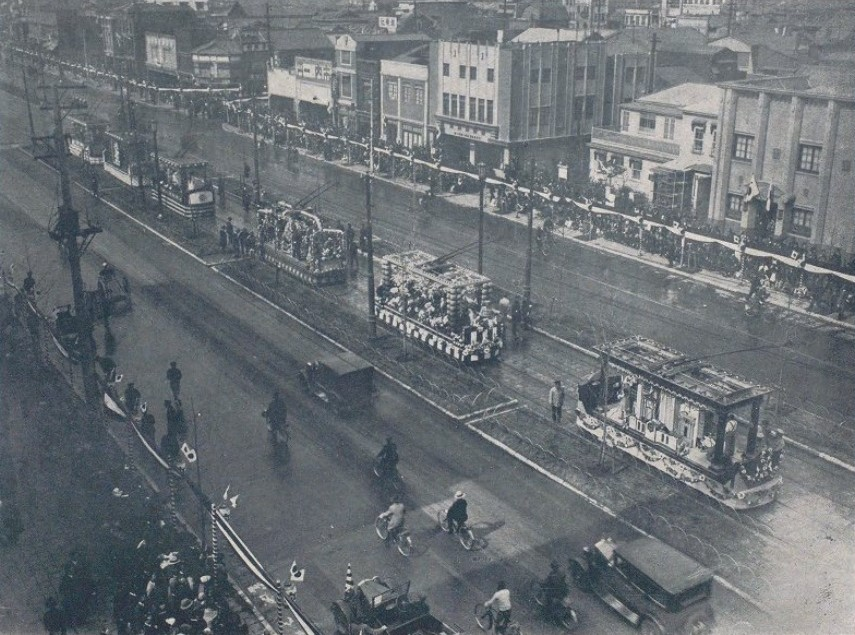 花電車 震災祝賀